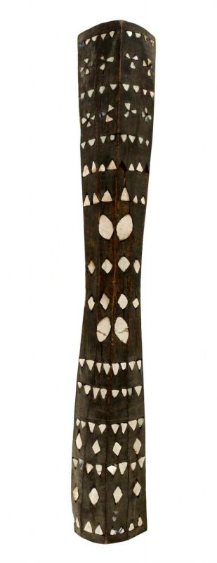 Schild. Houten dansschild, versierd met porselein Unknown language: Salawaku